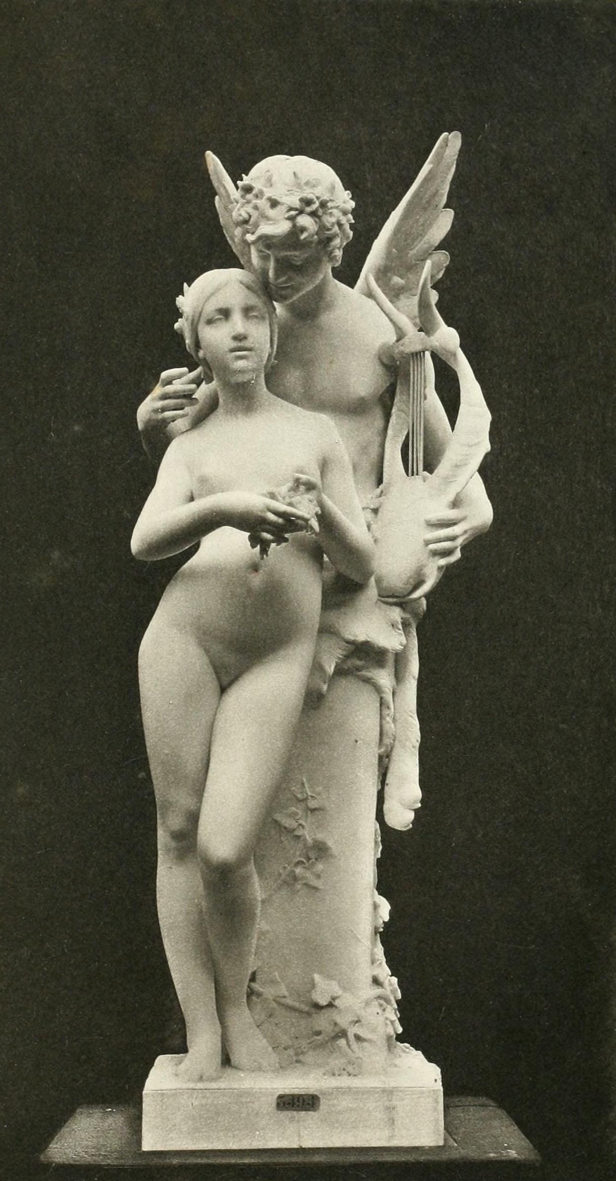 Printemps